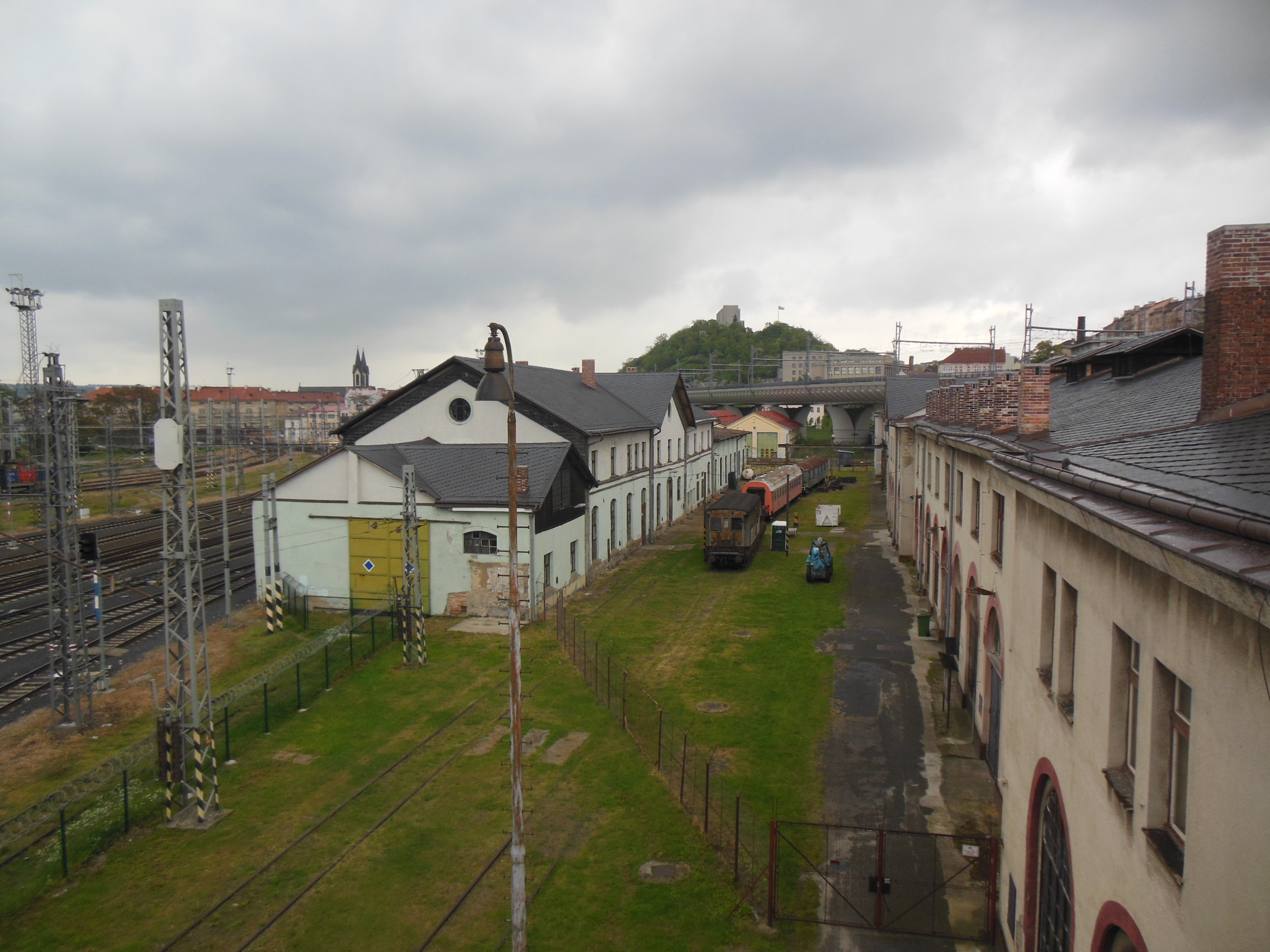 Bývalé depo v areálu Masarykova nádraží v Praze, pohled z přemostění Masarykova nádraží.